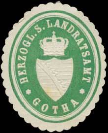 Sealing stamp Title: H.S. Landratsamt Gotha Description: grün, weiß, geprägt Place: Gotha size: 4x3 cm